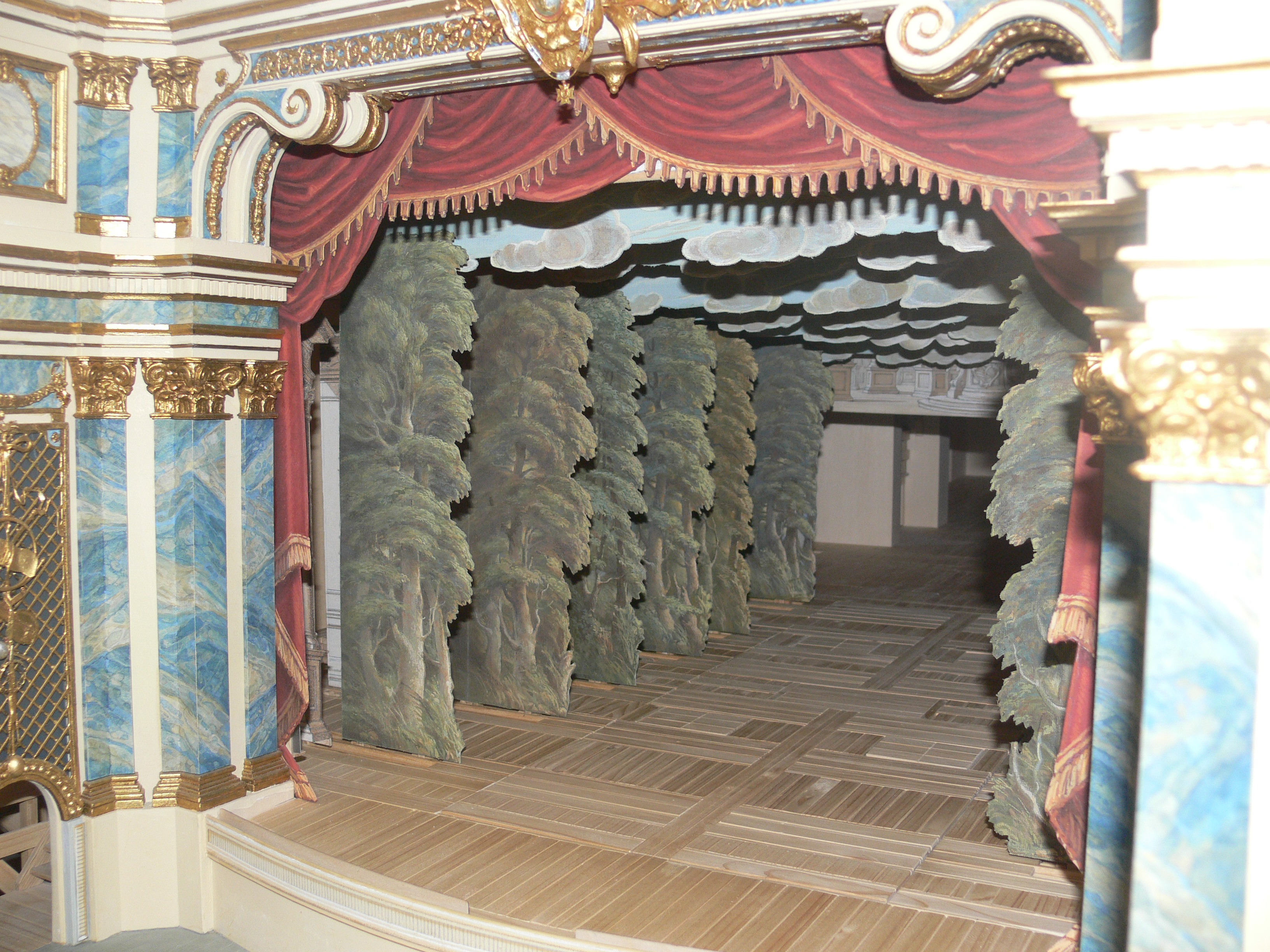 Miniatur-Theatermodell mit barocker Bühnenmaschinerie im Schlosstheater Schwetzingen